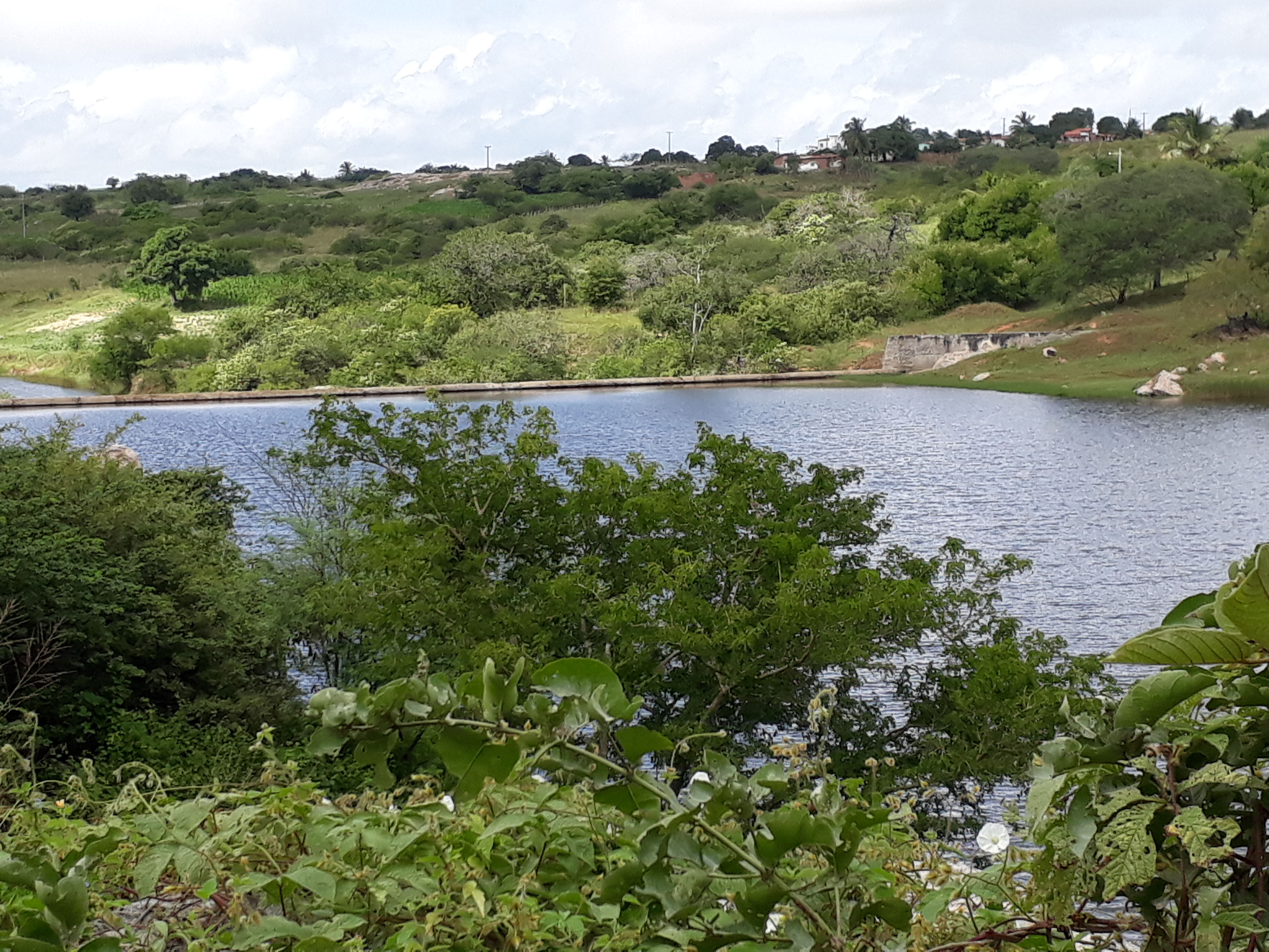 Comunidade do Guarani